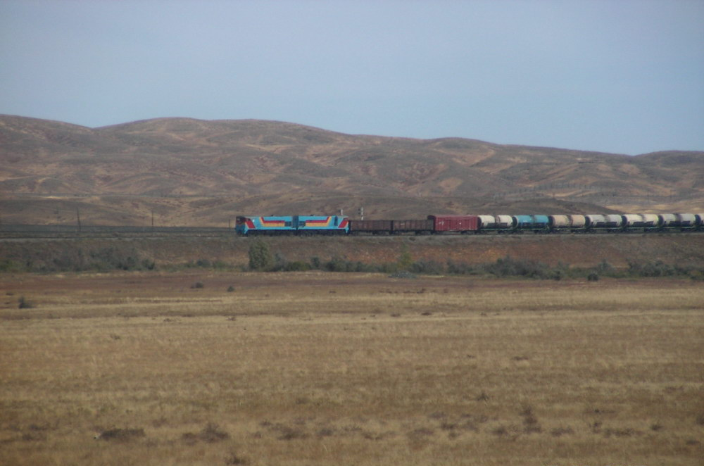 Горы Мугоджары|Мугоджары